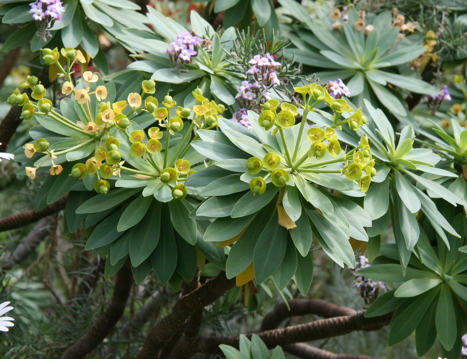 Euphorbia bourgeana im Botanischen Garten Erlangen